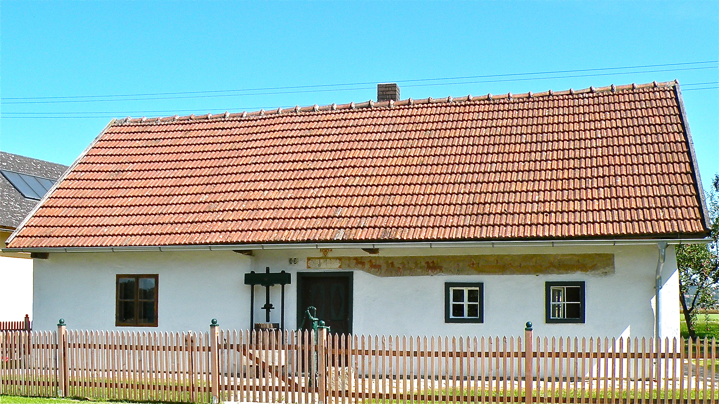 Schiffzug in Oberwagram, Katastralgemeinde Au, Marktgemeinde Naarn im Machlande im Bezirk Perg in Oberösterreich